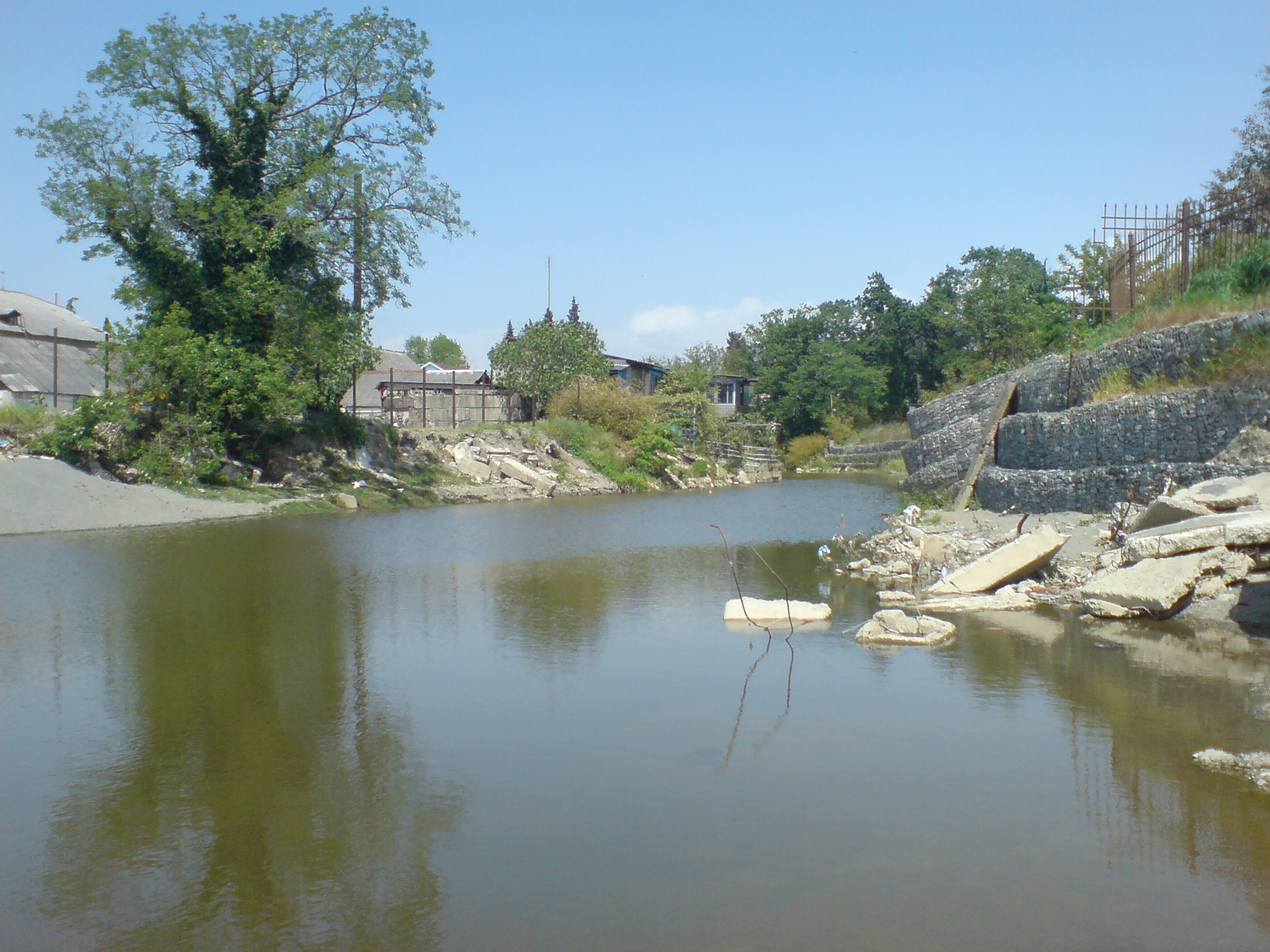 Устье Хероты со стороны моря